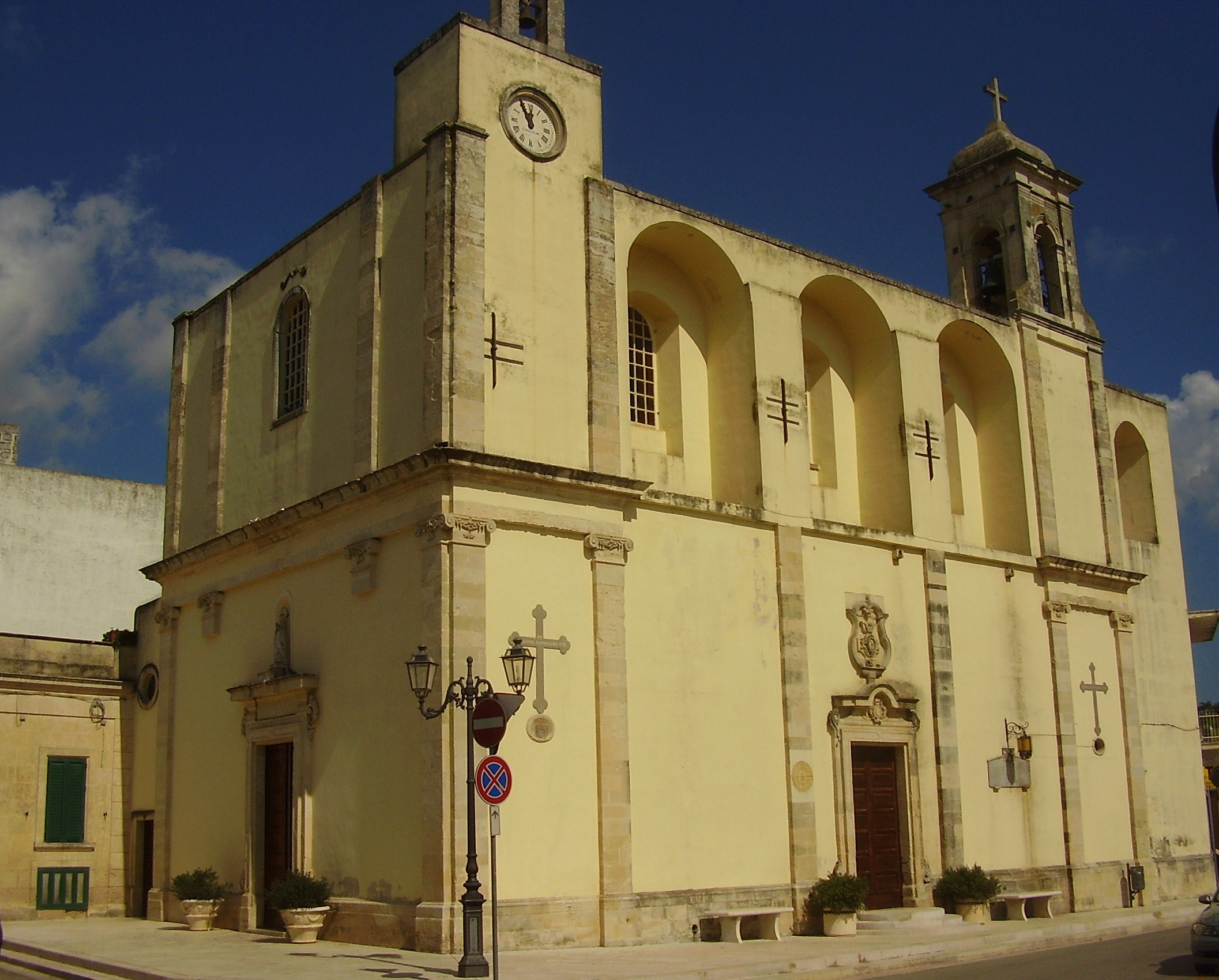 Chiesa Madre di San Cassiano, Lecce, Italy